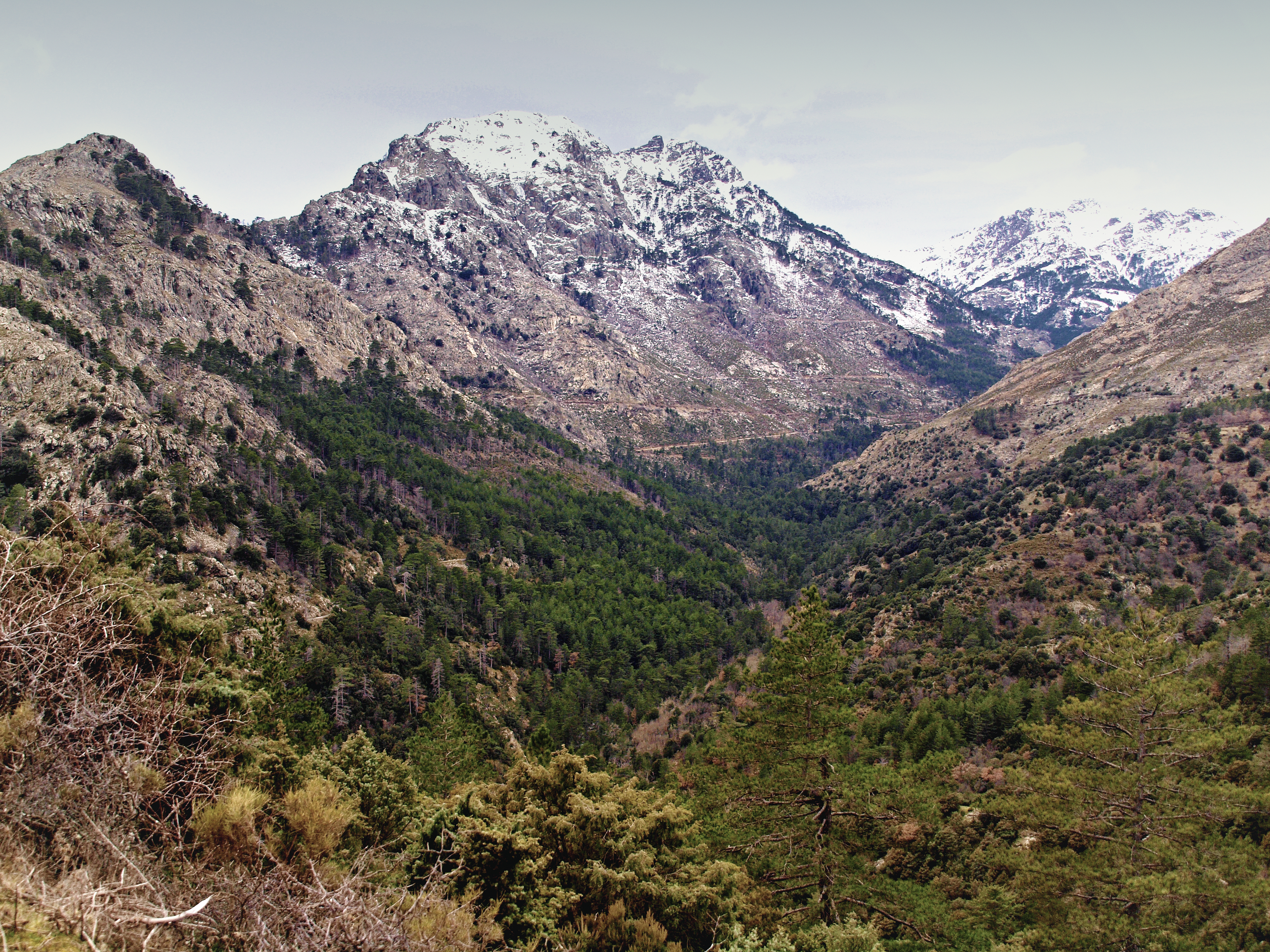 Olmi-Cappella (Corsica) - Vallée de la Tartagine et le Monte Padro